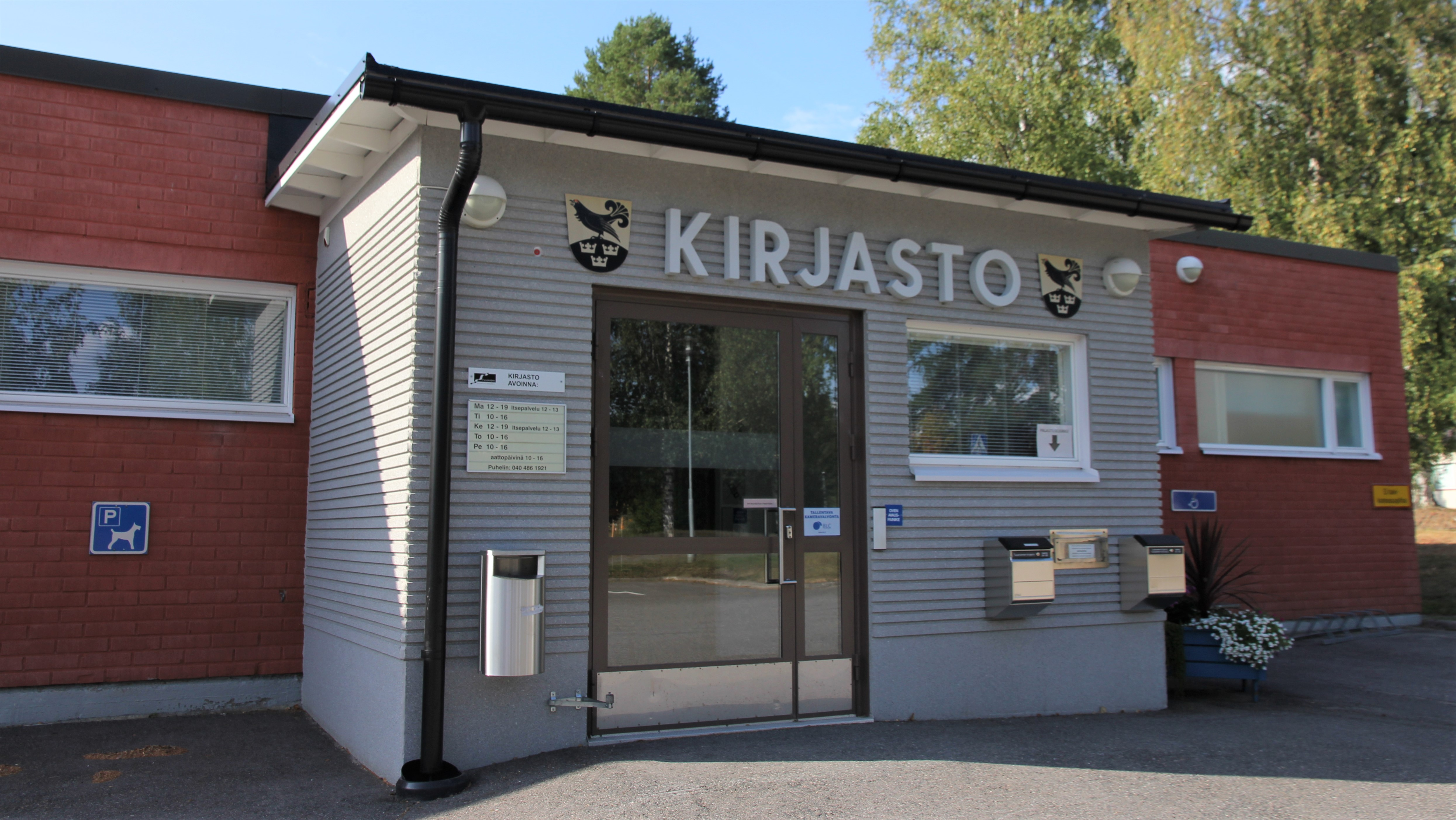 Tuusniemen kirjasto on Turulan koulukeskuksen yhteydessä sijaitseva kunnankirjasto Tuusniemen kirkonkylällä. Sen toimintaa hallinnoi Kuopion kaupunginkirjasto. Tuusniemen kirjasto toimii osoitteessa Keskitie 34-38.